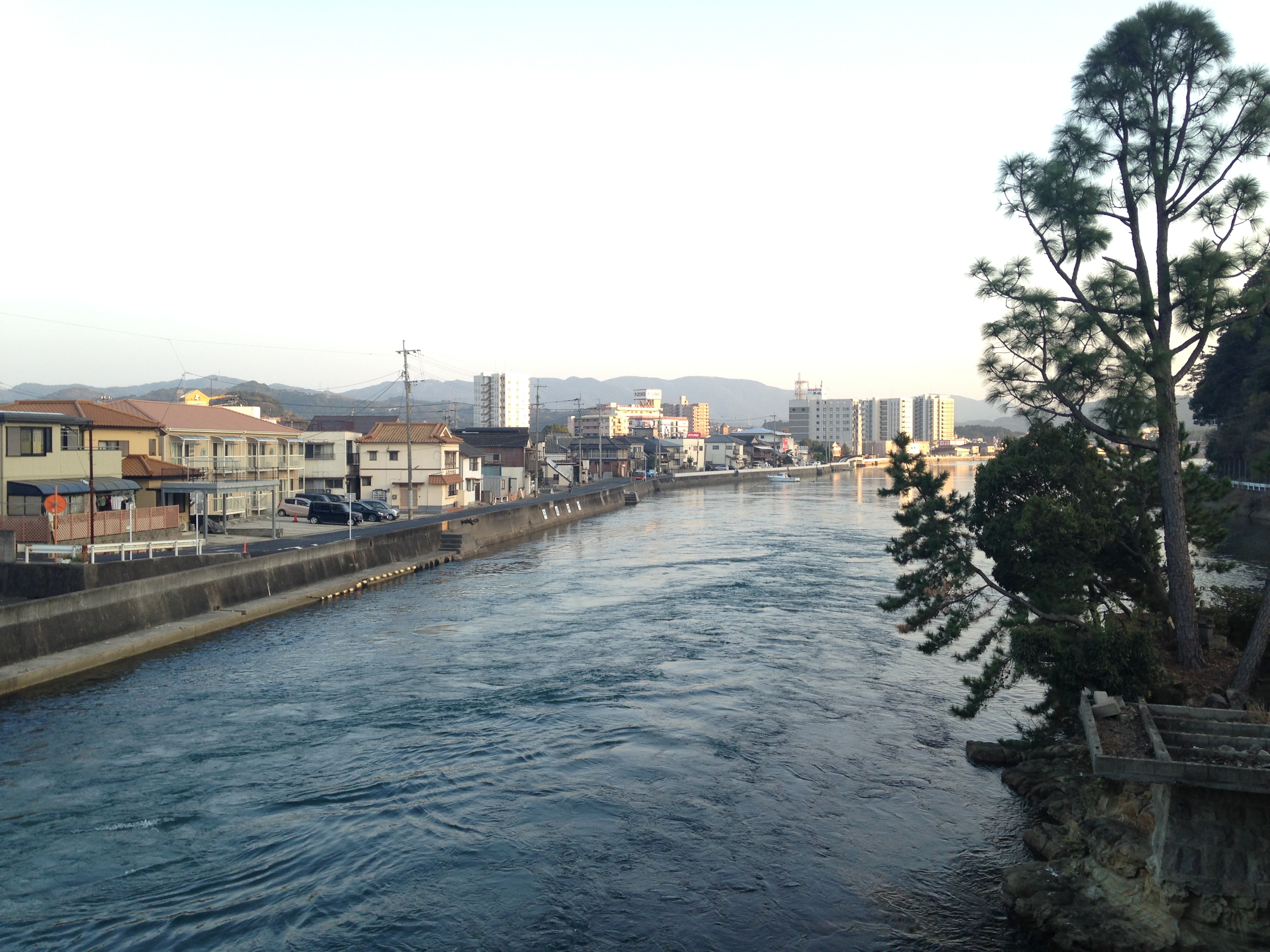 観潮橋より望む早岐瀬戸(南側)